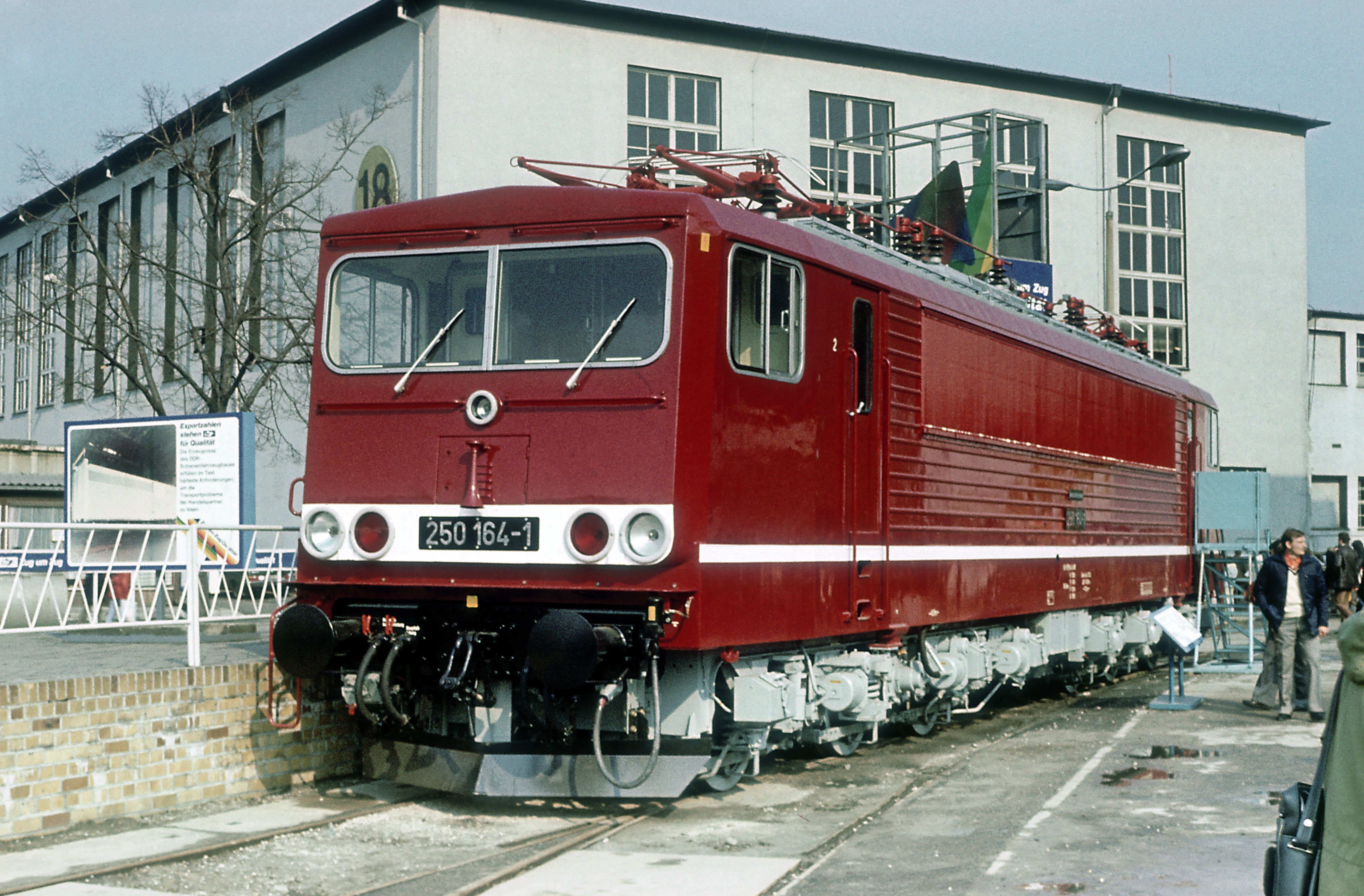 Serienmaschine, fabrikneu auf der Leipziger Frühjahrsmesse 1982 ausgestellt